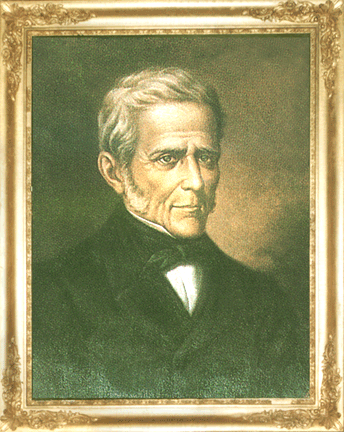 Quadro do Dr. João Victorino de Souza e Albuquerque (cópia do quadro pintado por Almeida e Silva existente na Câmara Municipal de Viseu)